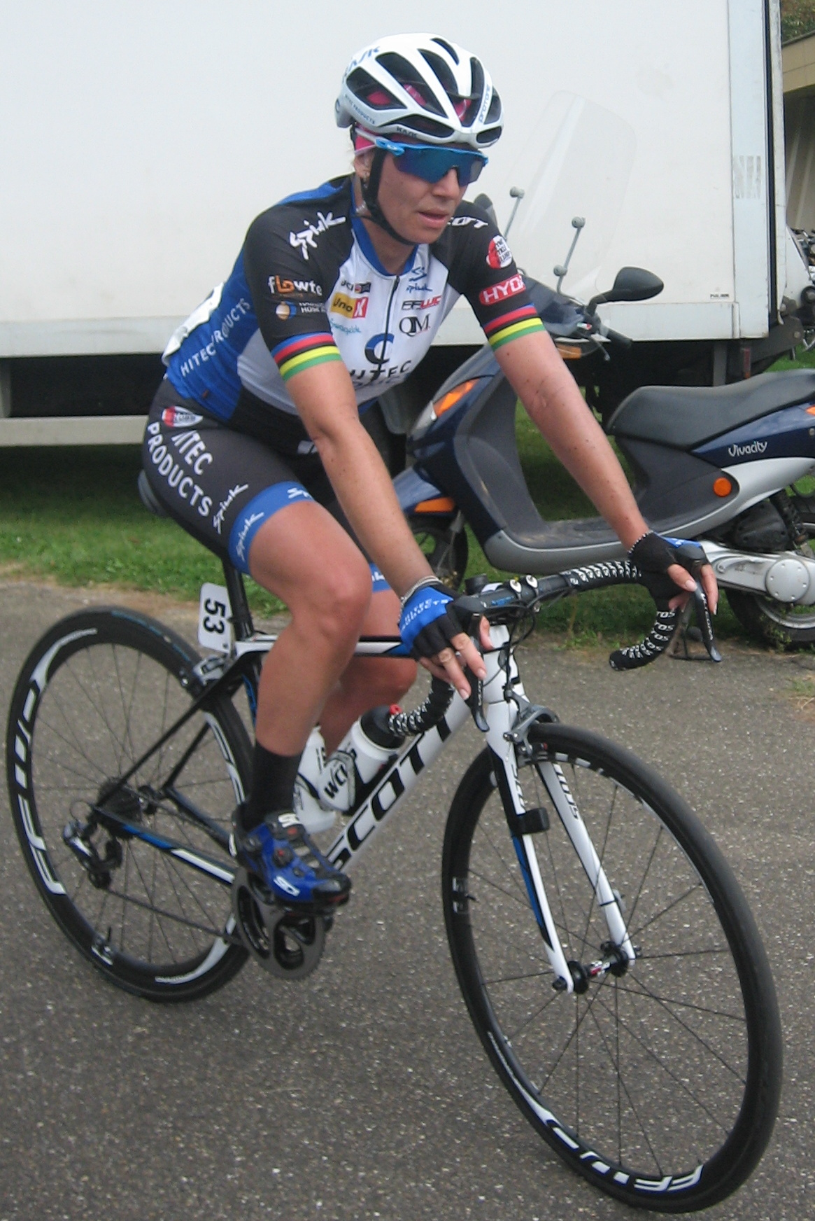 Tatiana Guderzo na de finish van de 3e etappe van de Boels Ladies Tour 2016 in Sittard, Limburg.